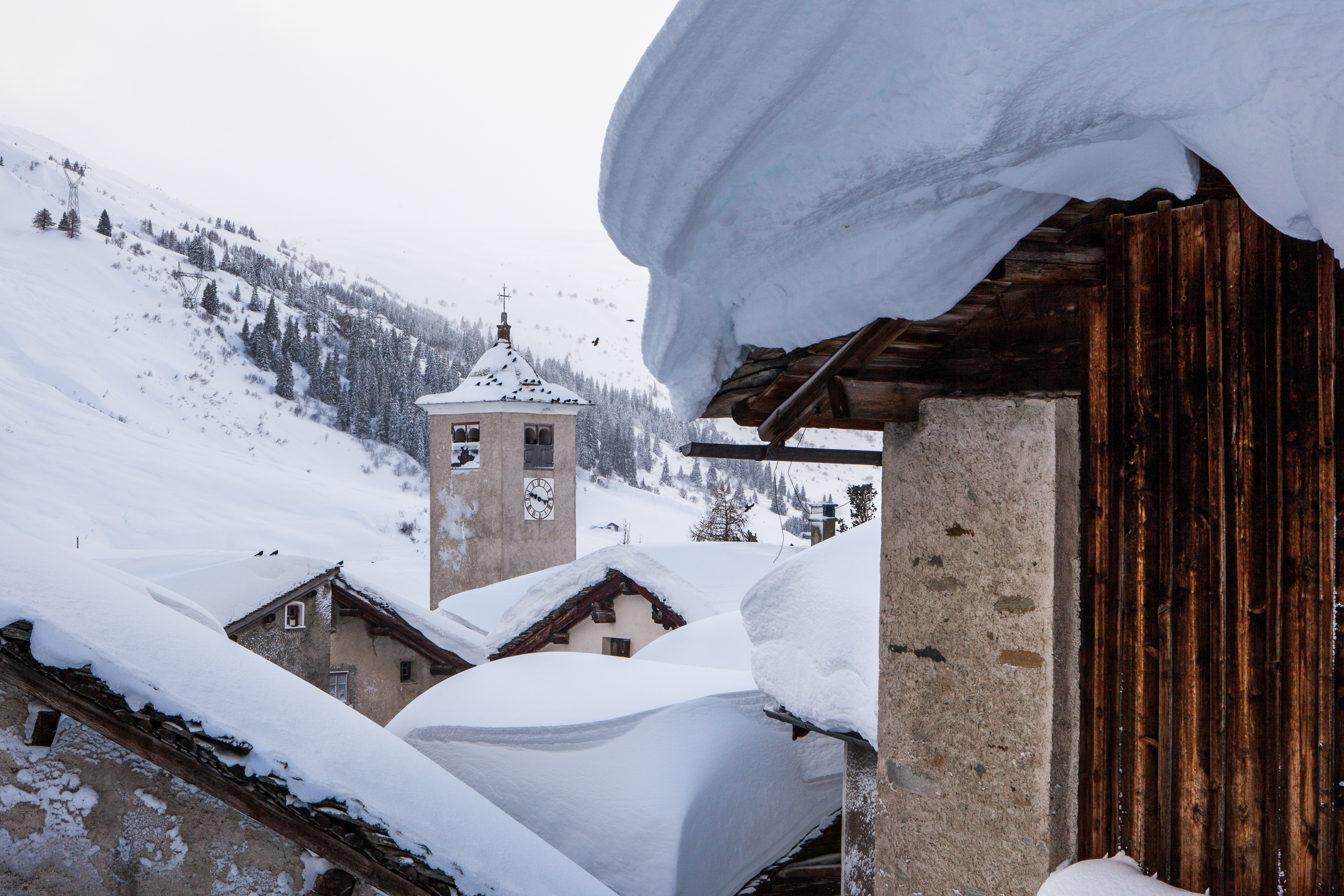 Dorfteil (Riimatta) in Hinterrhei, mit Kirche